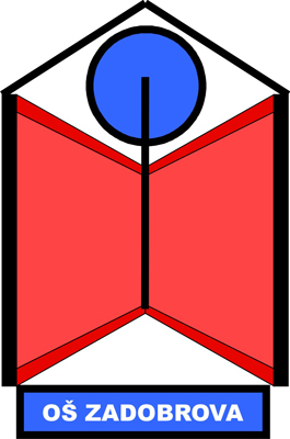 Znak osnovne šole Zadobrova